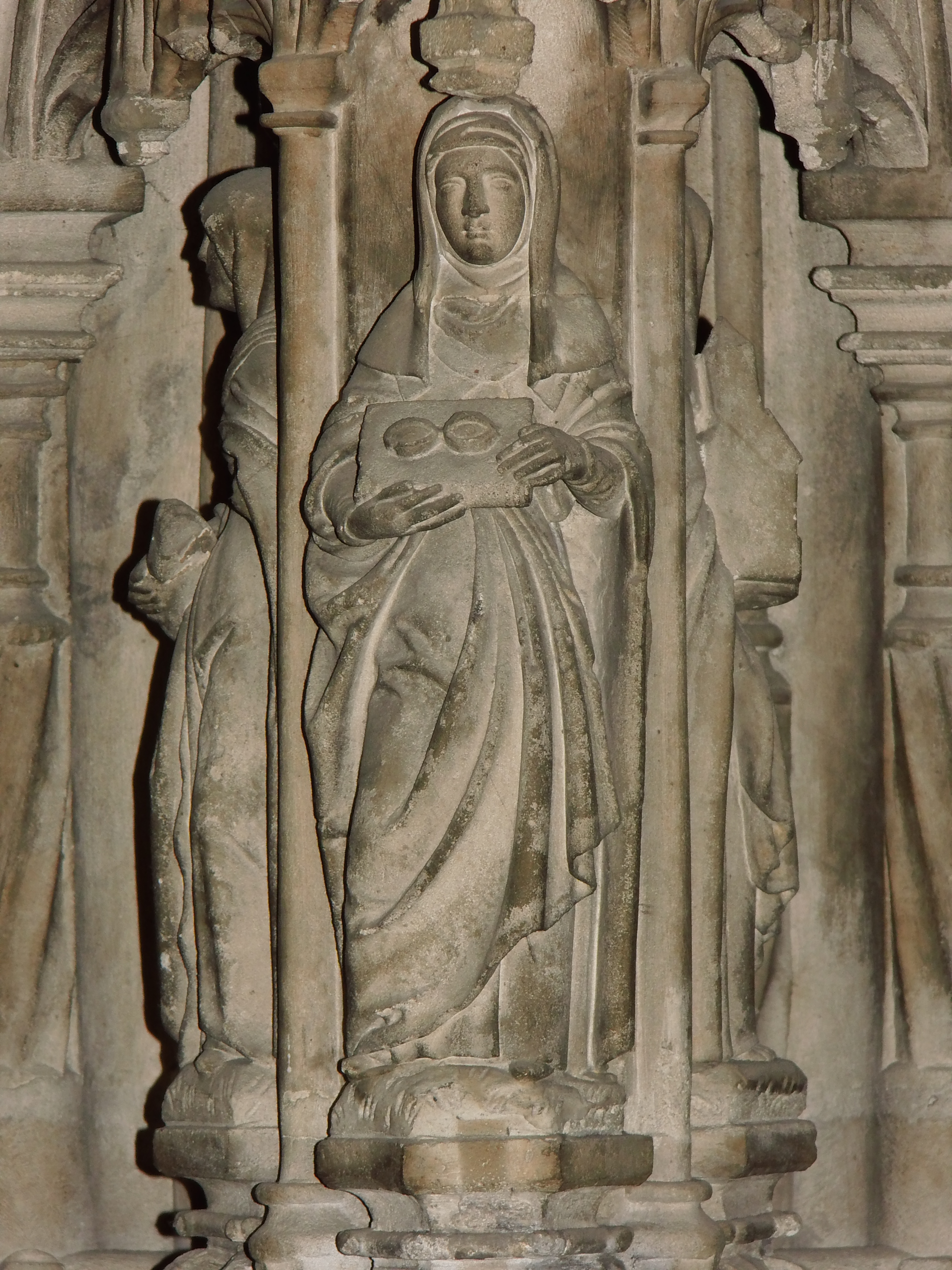 Figur der hl. Ottilie am Fuß der Kanzel des Stephansdoms (Wien)